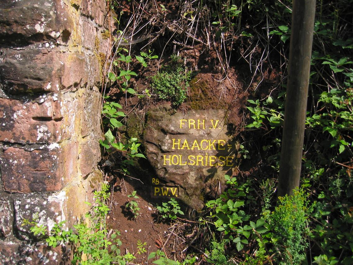 Ritterstein Nummer 121, Frh. v. Haacke_Holsriese